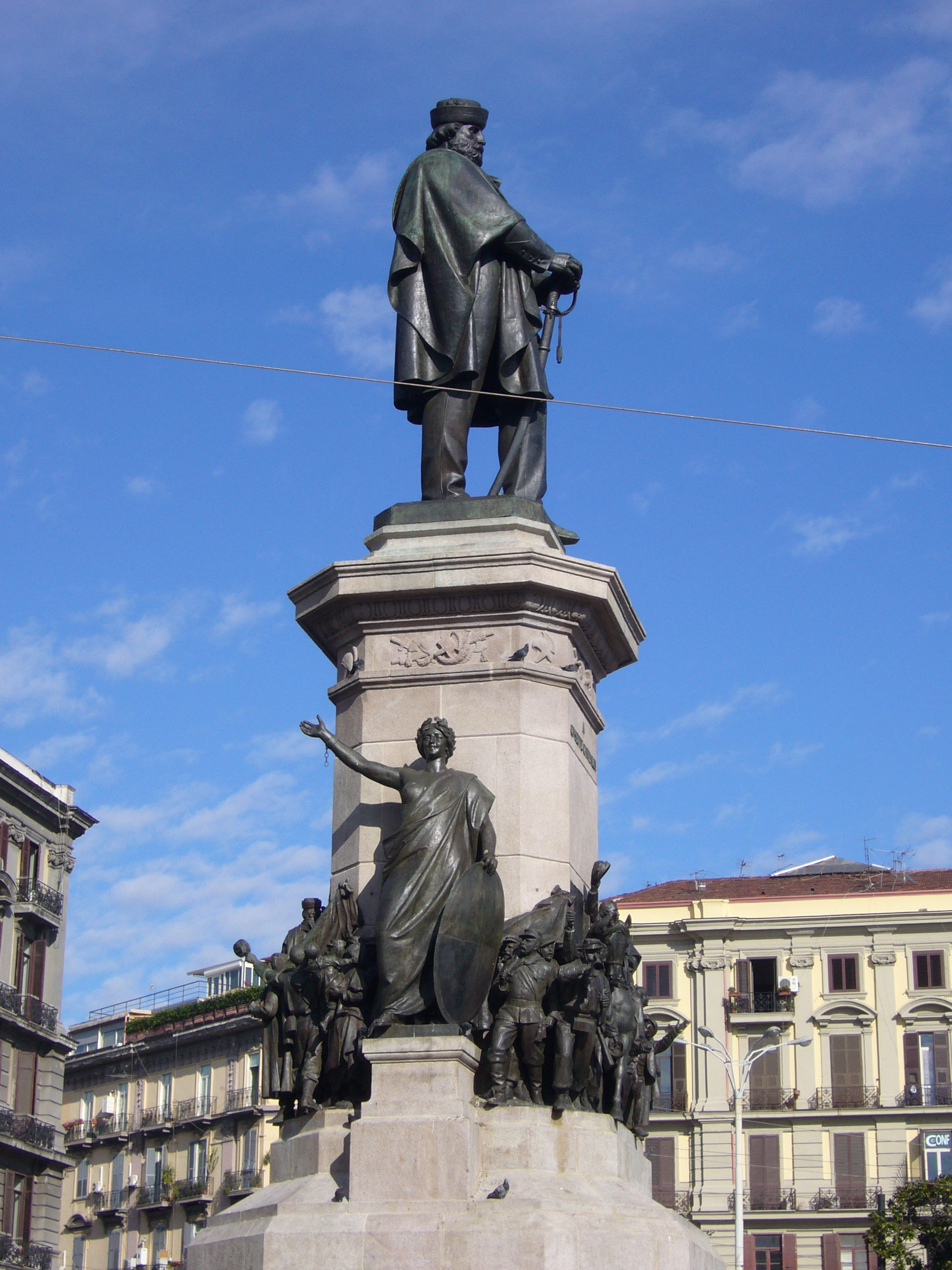 Statua di Giuseppe Garibaldi sita a Napoli in Piazza Garibaldi. Opera del 1904 di Cesare Zocchi (1851-1922).